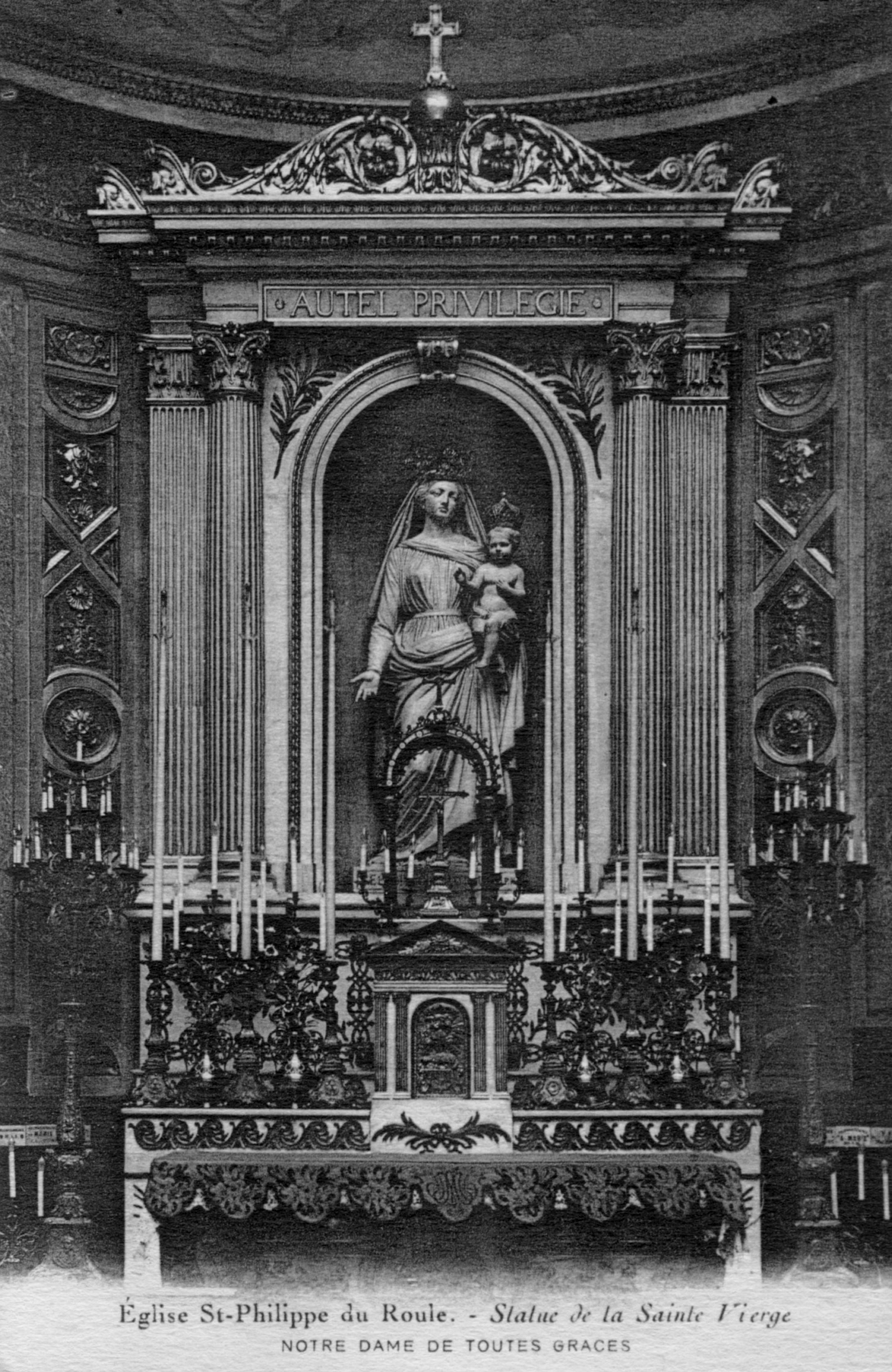 Eglise Saint-Philippe Du Roule. Statue De La Sainte Vierge. Notre-dame de Toutes Grâces. (Imp. Liva – 15, r. Saussier-Leroy, Paris)